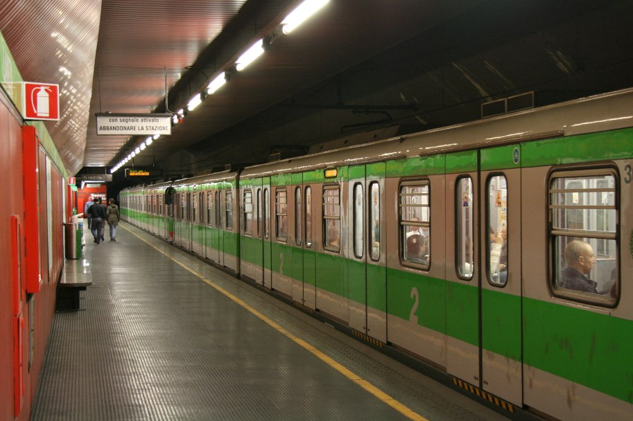 Elettrotreno della linea 2 della metropolitana di Milano in sosta a Lanza